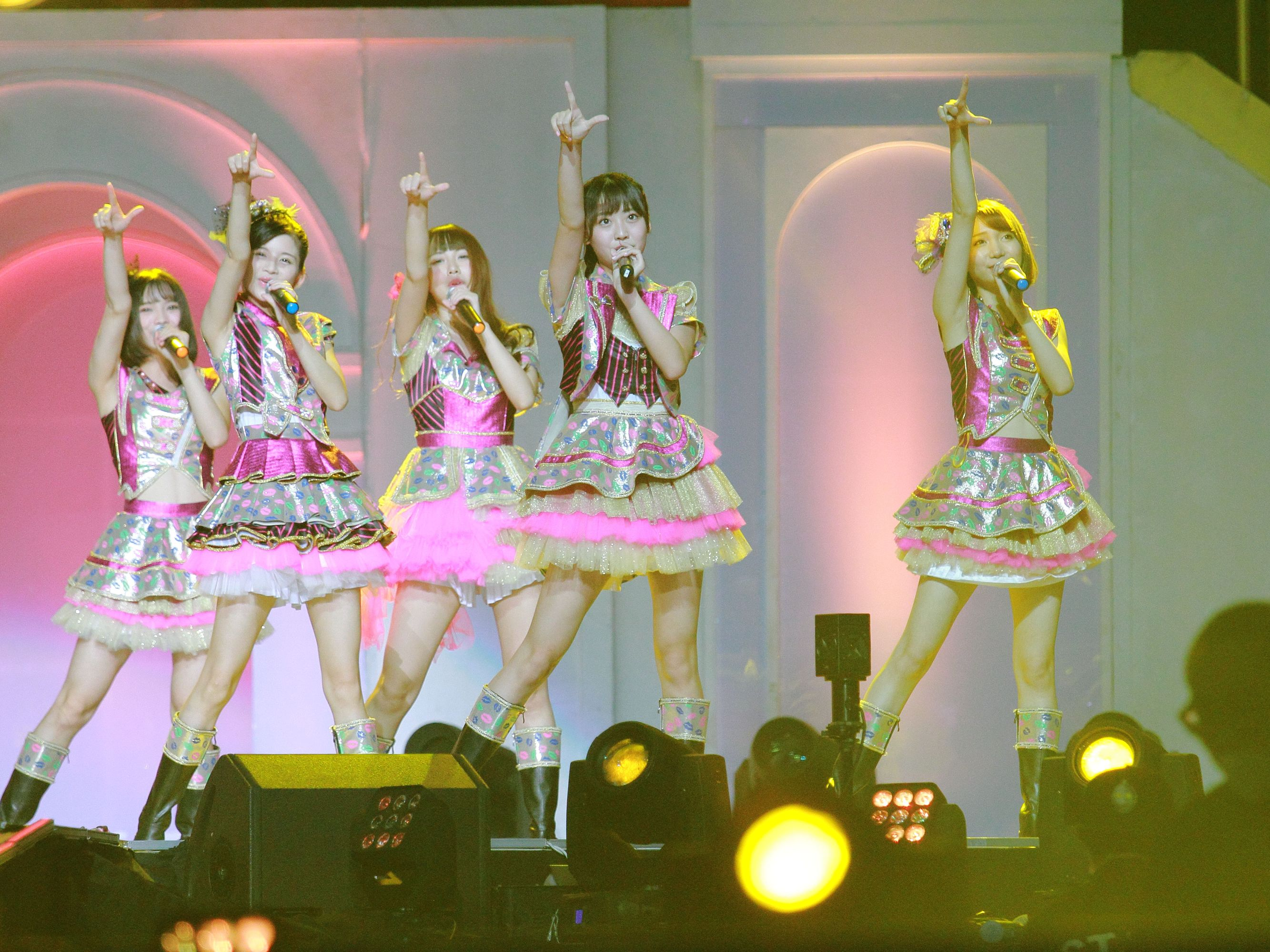 SNH48 第二届总选举